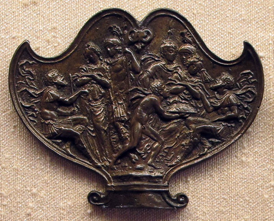 Placchette rinascimentali